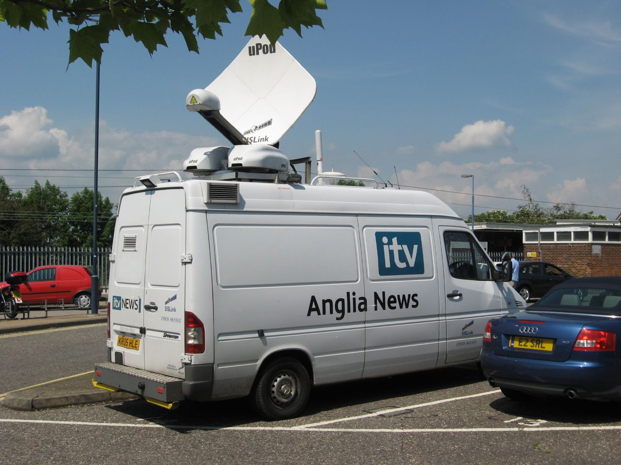 ITV Anglia News van side